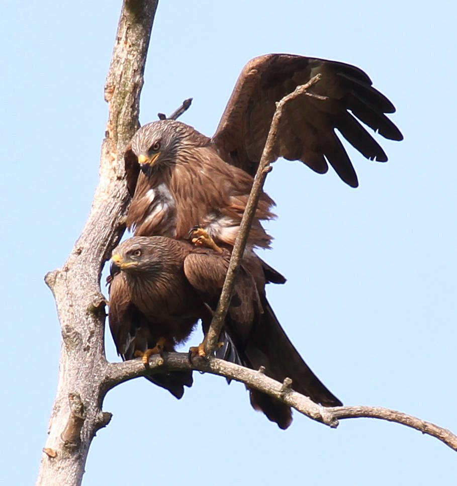 Milvus migrans migrans (Schwarzmilan) in Hessen, Deutschland